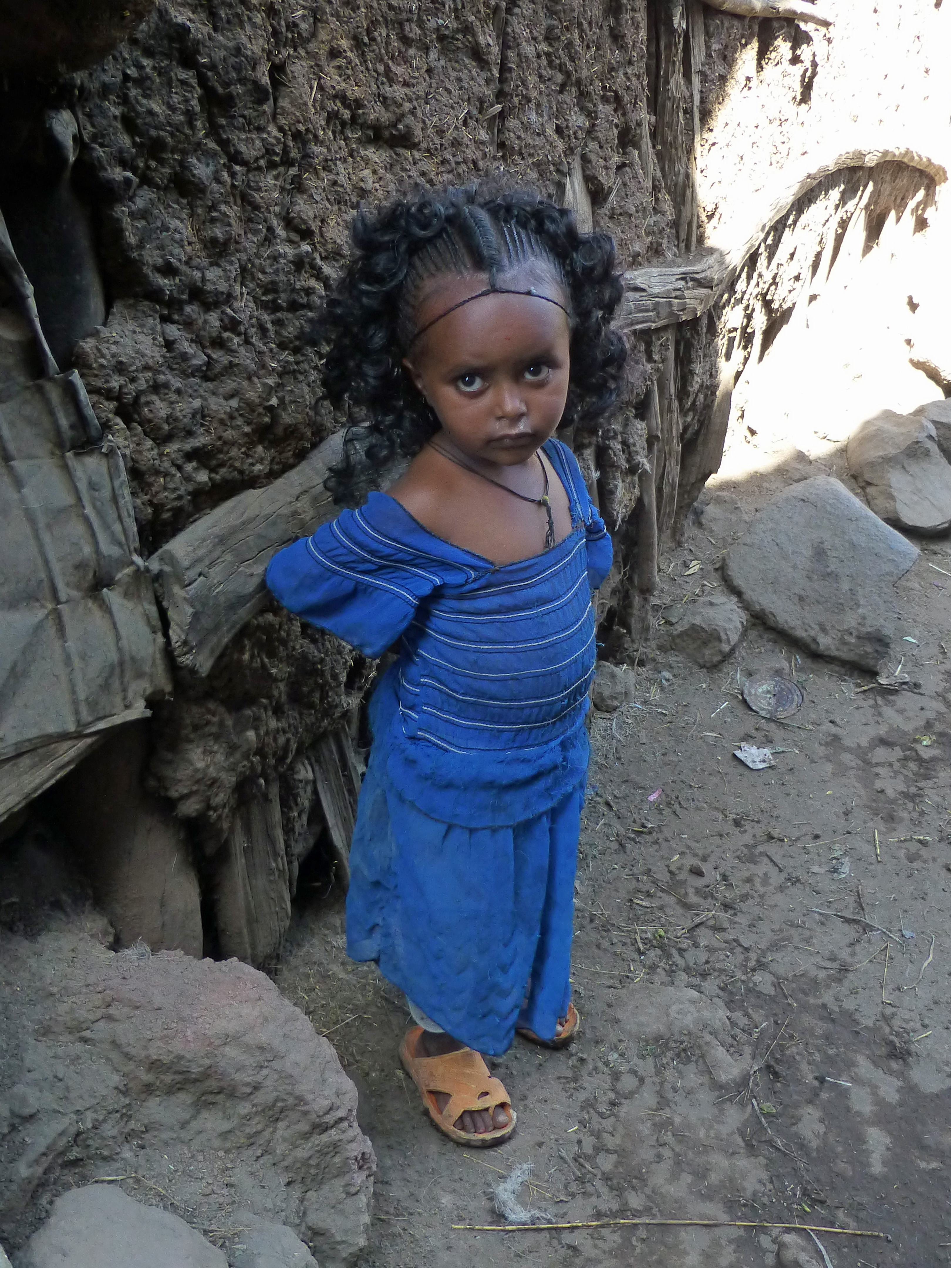 Ethiopie, région Amhara : fillette à Lalibela